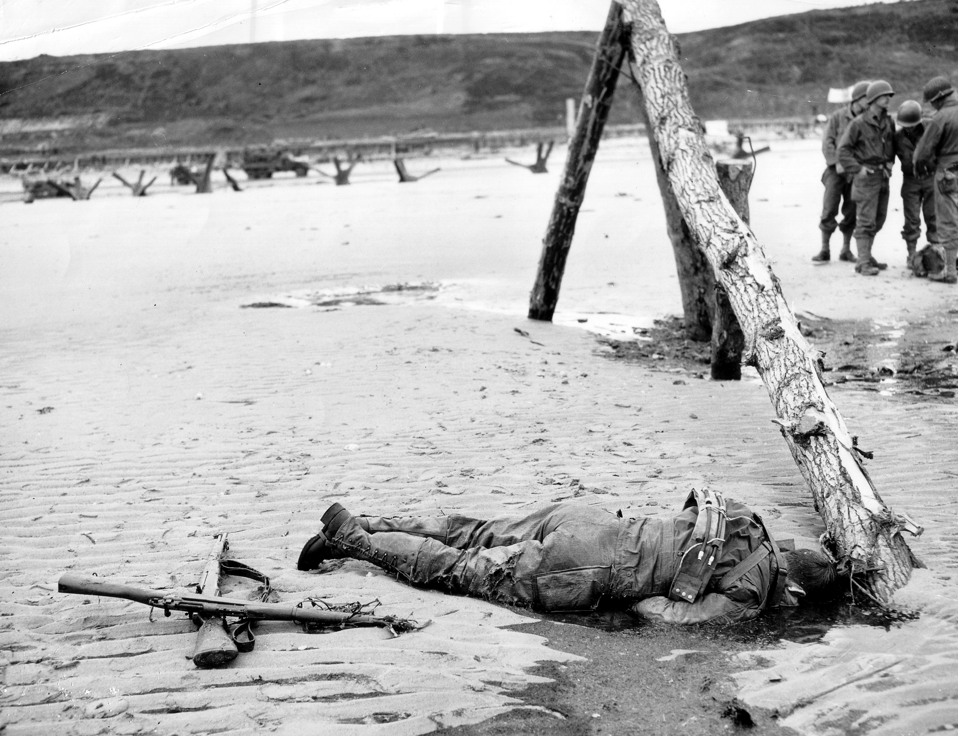 US Navy : débarquement américain en Normandie : Omaha , après le D-Day. Au pied d'une "Asperge de Rommel" git le corps d'un GI qui n'a pas encore été ramassé, à coté de deux fusils jetés pele-mele.